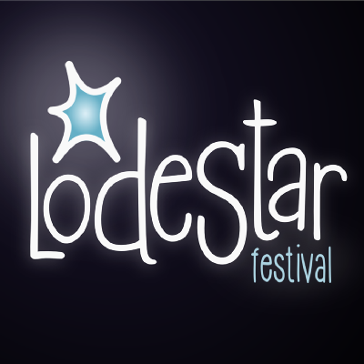 Logo